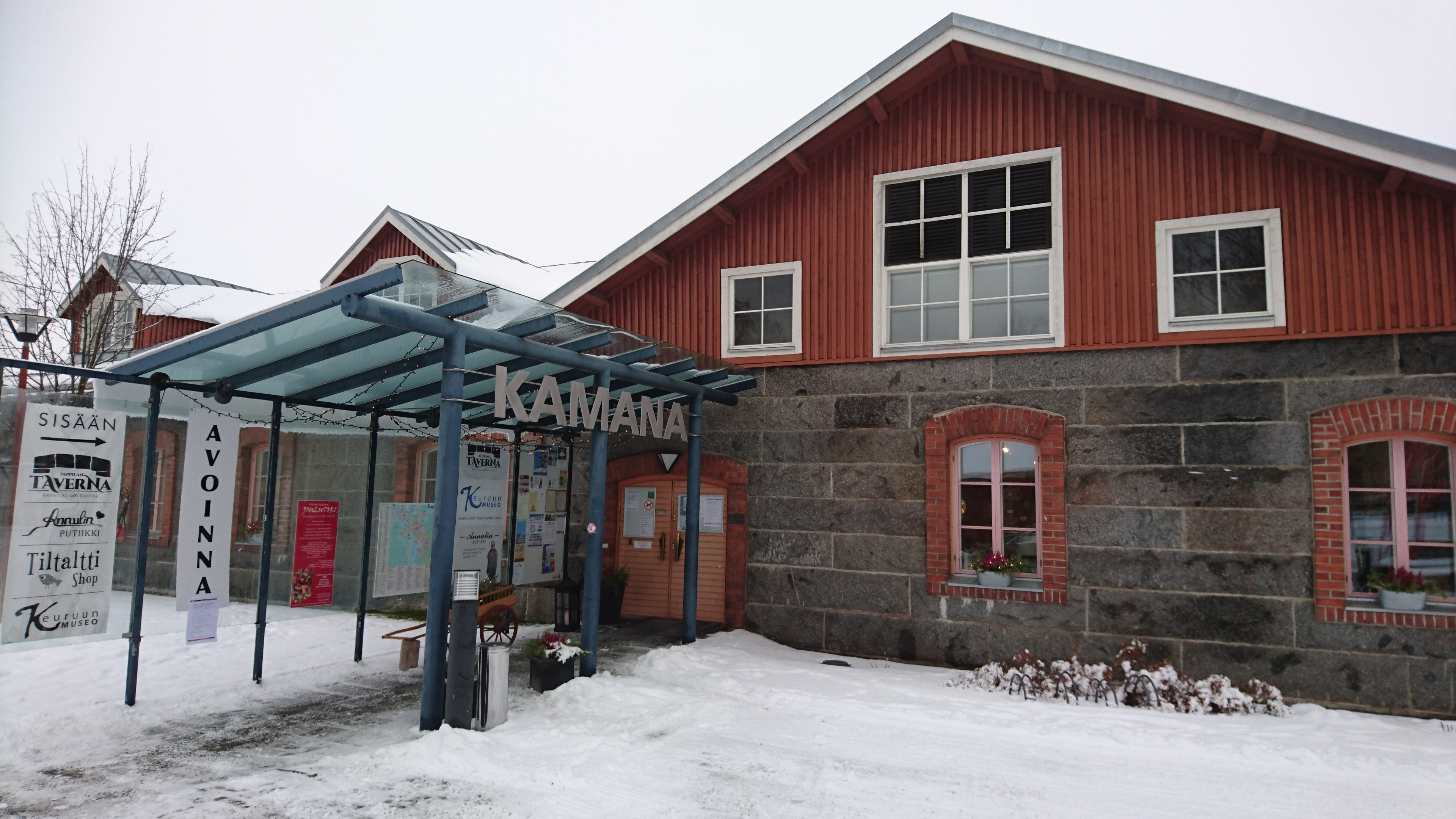 Keuruun museo